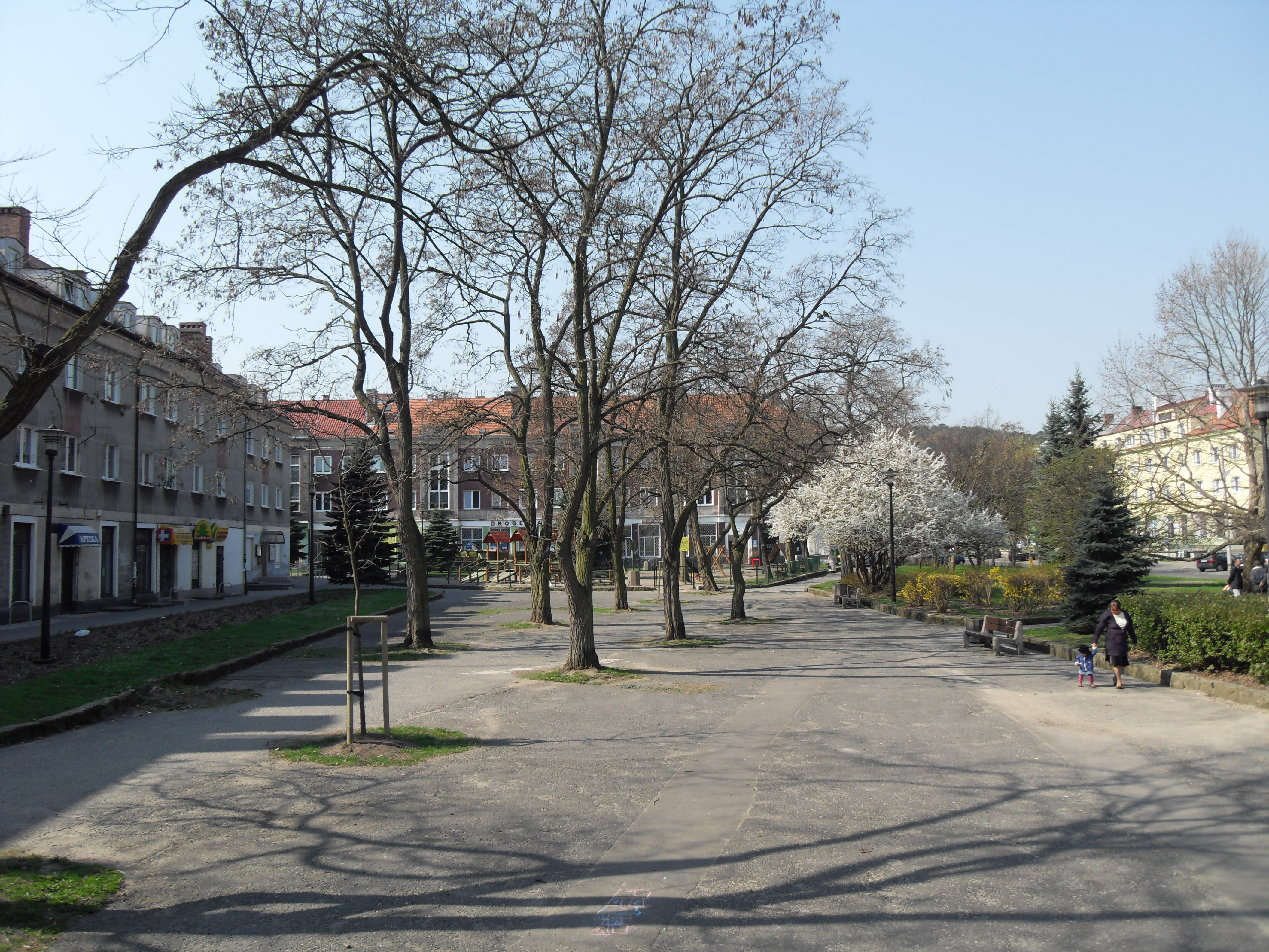 Gdańsk Strzyża, plac generała Stanisława Maczka.